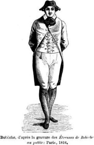 Bobèche, after the Étrennes de Bobèche au public, Paris, 1816